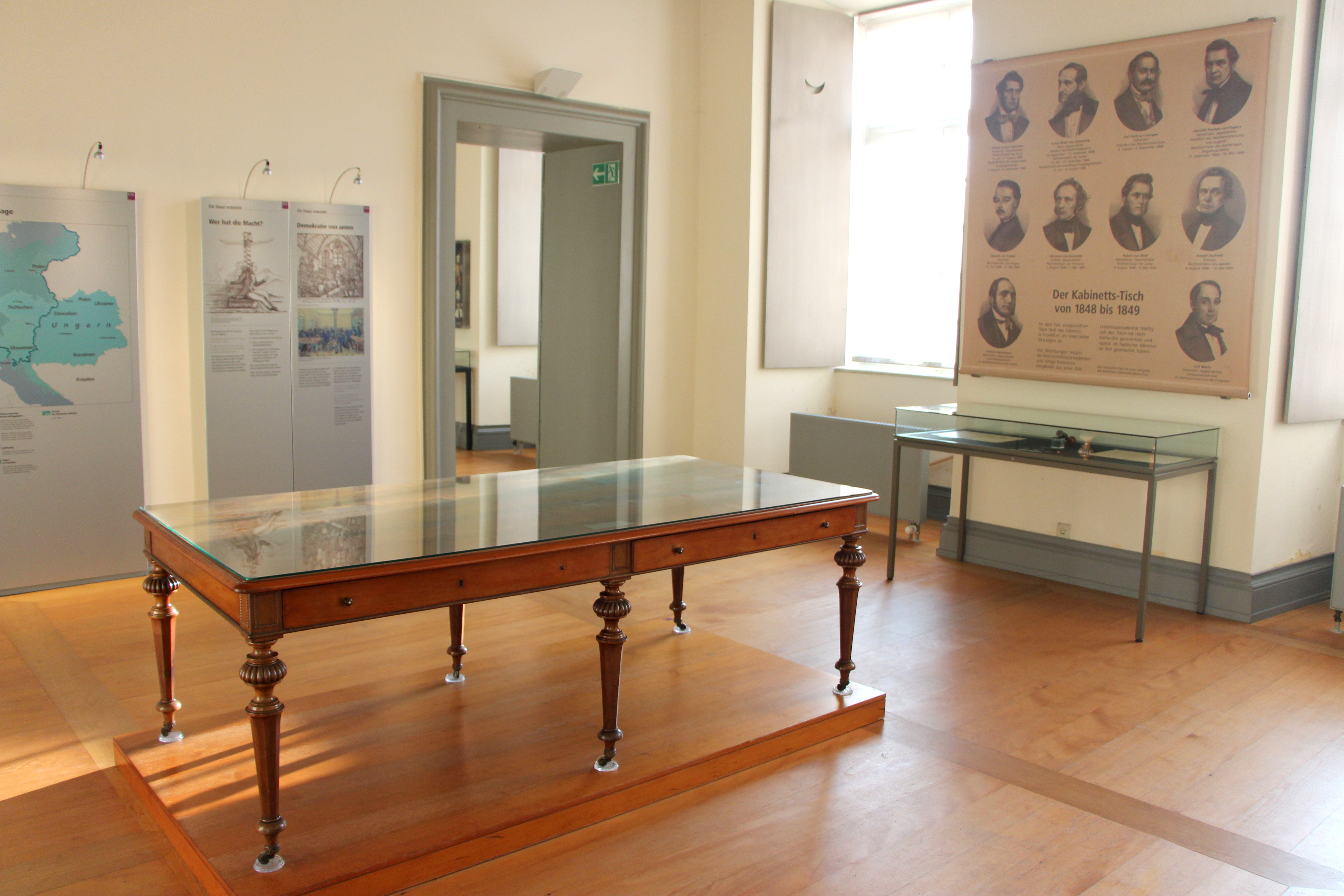 Erinnerungsstätte für die Freiheitsbewegungen in der deutschen Geschichte. Übersicht Reichsminister und Tisch des Gesamt-Reichsministeriums.